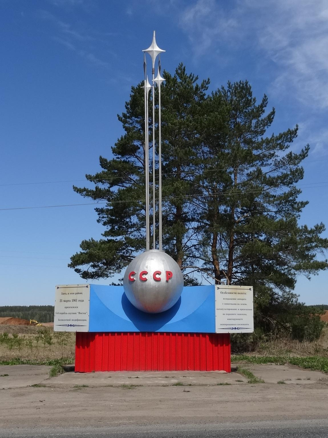 Denkmal für die erfolgreiche Rückkehr des unbemannten Raumschiffs Sputnik-10 (Korabl-5) in der Nähe der Landezone